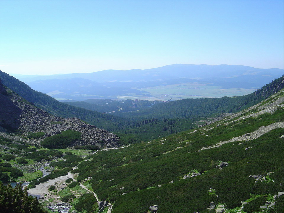 Mlynicka dolina from over Vodopad Skok